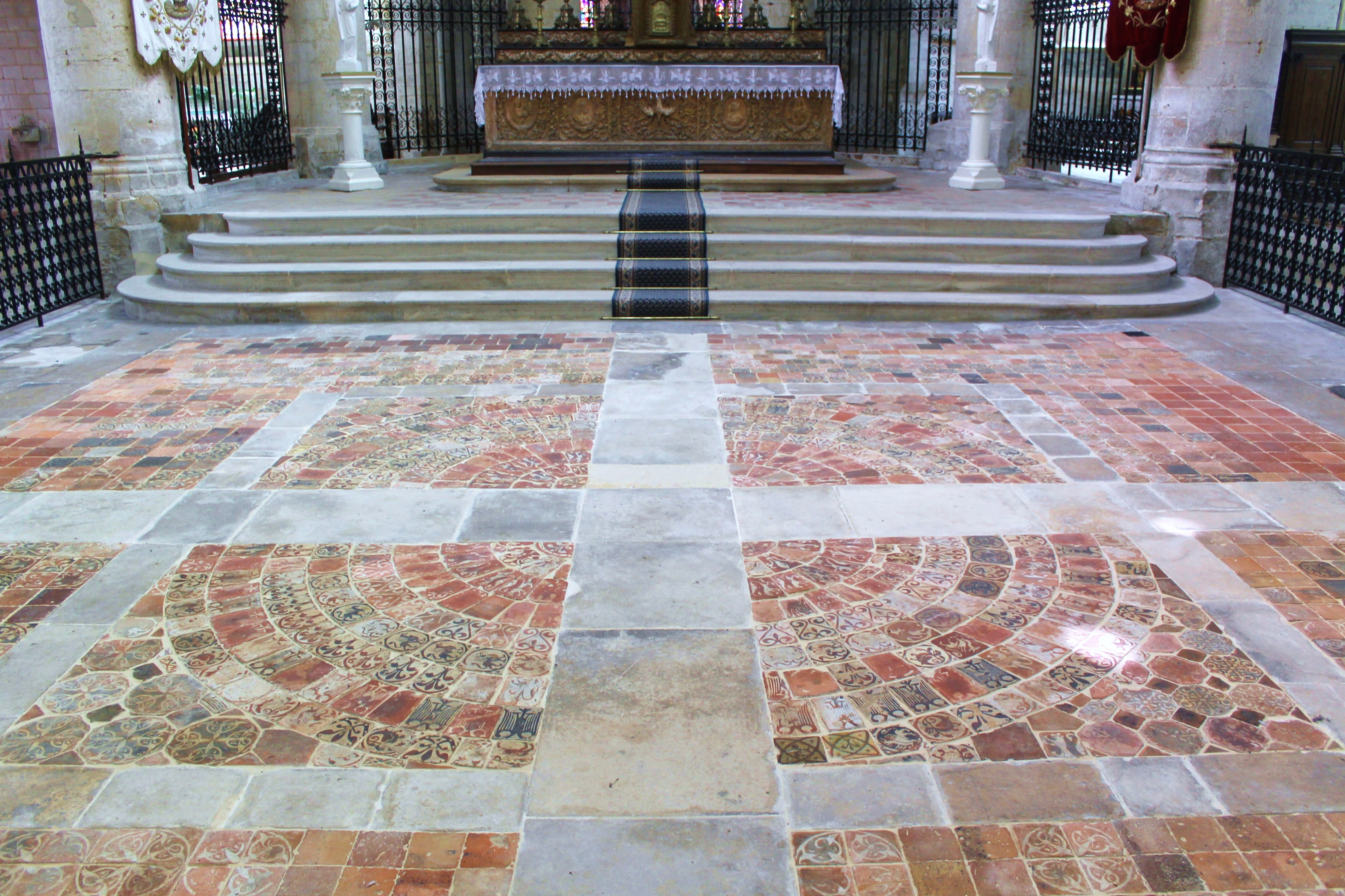 Pavement du XIIIe dans le chœur de l'abbatiale Saint-Pierre-sur-Dives (Calvados) Base Mémoire